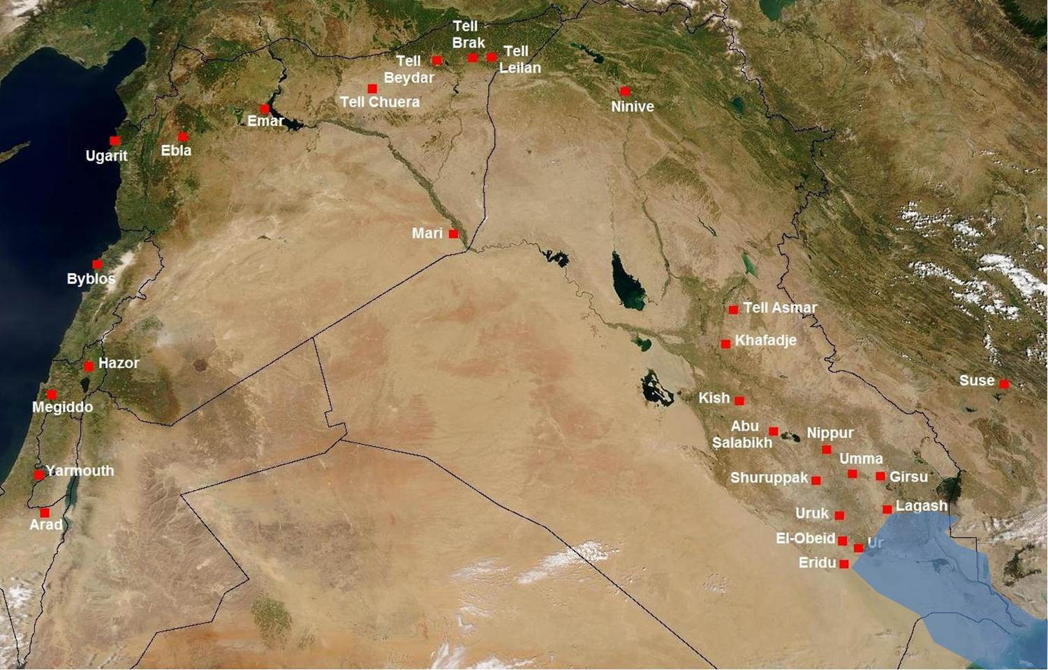 Schema zu den antiken Küstenverläufen der Uruk-Zeit; beruhend auf File:Predynastique.jpg